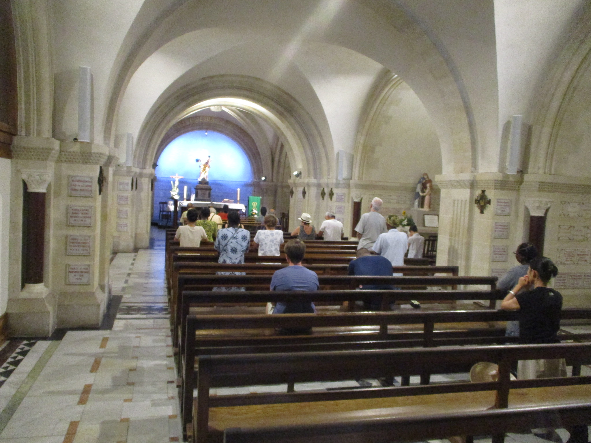 Crypt of Basilique Notre-Dame de la Garde